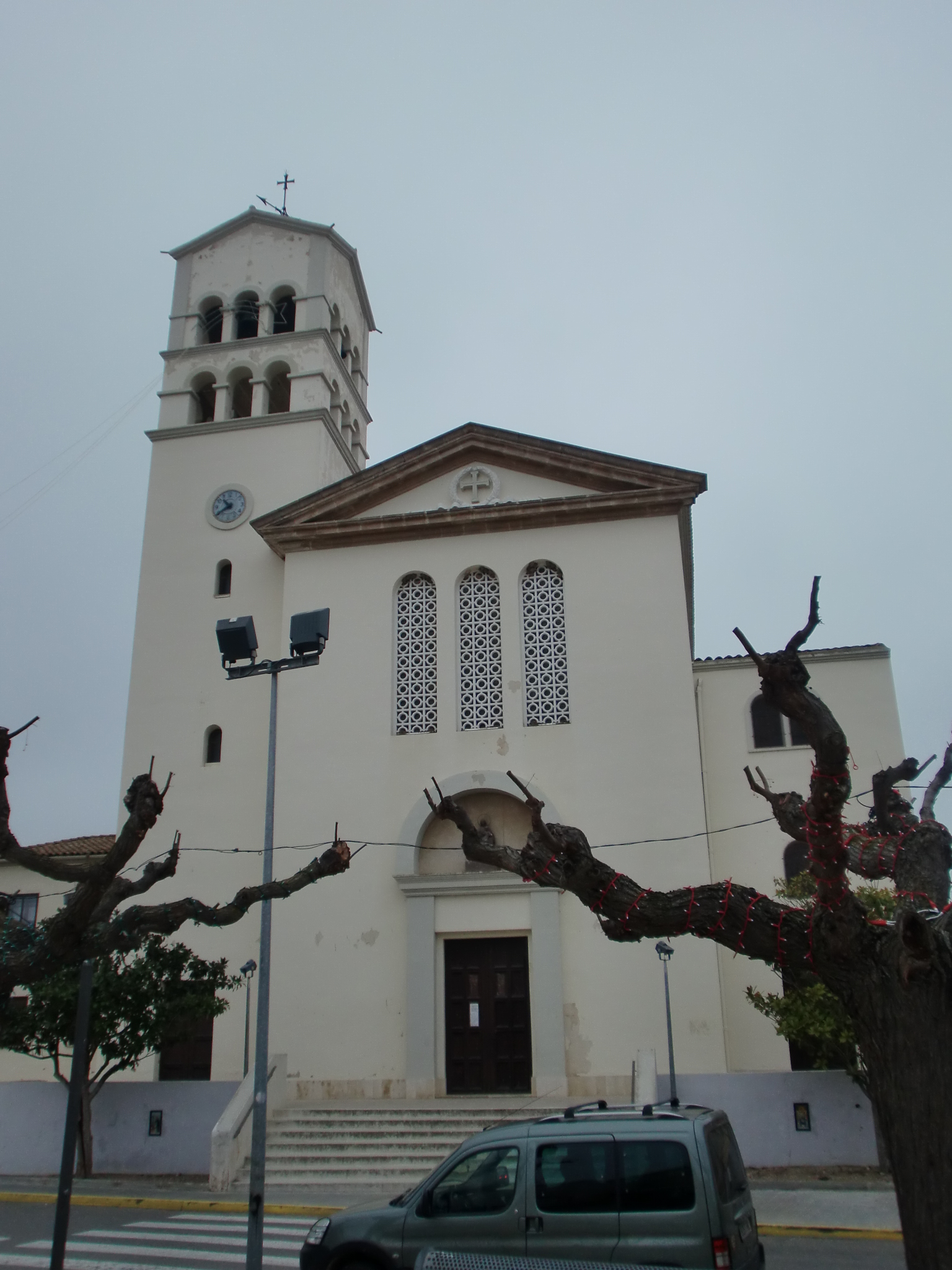 Església Nostra Senyora del Remei (Móra la Nova)